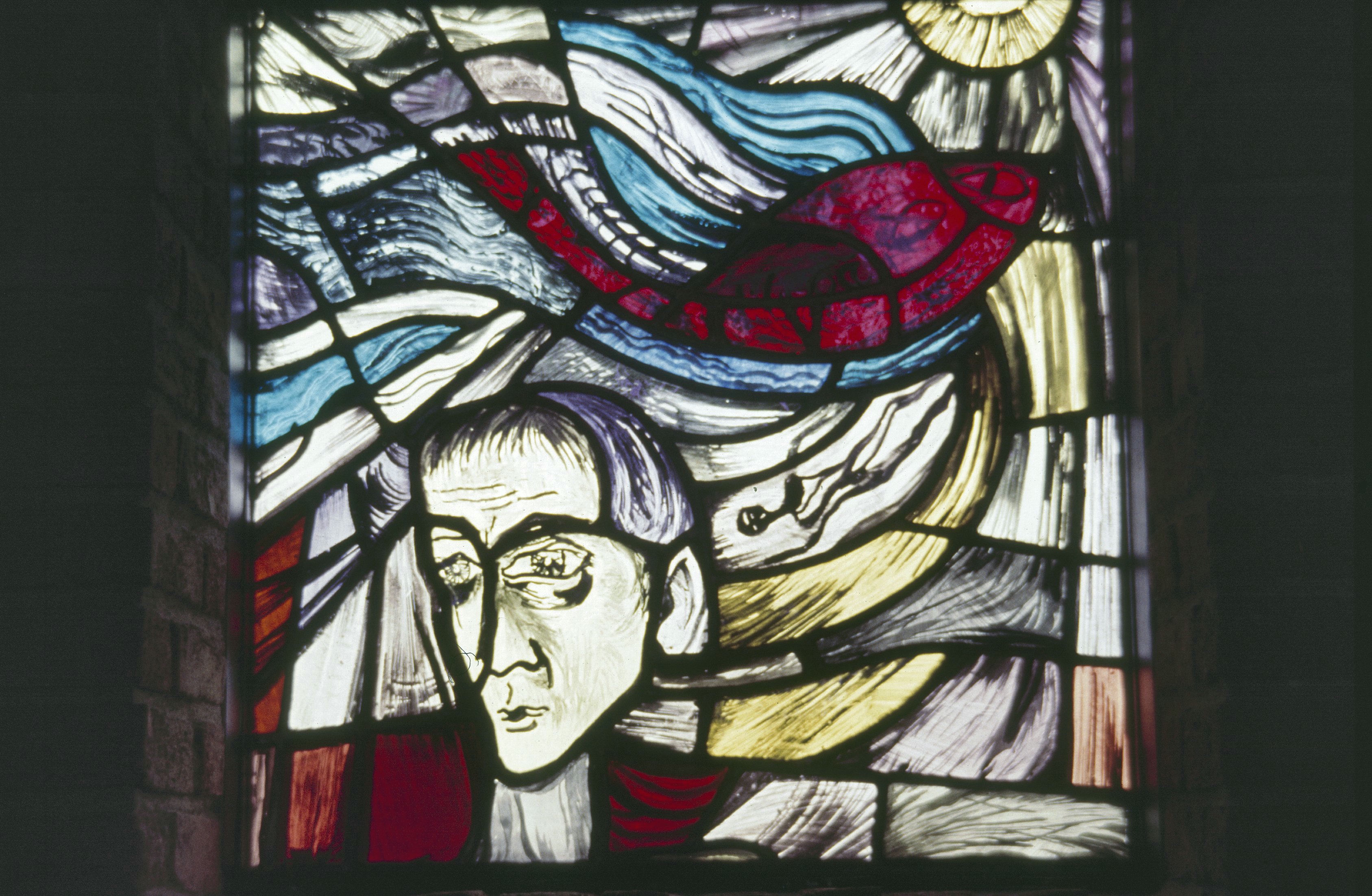 Gereformeerde Fenixkerk: Interieur, aanzicht gebrandschilderd glas-in-loodraam van Jan Murk de Vries (opmerking: Gefotografeerd voor Glas in lood in Nederland 1817-1968)